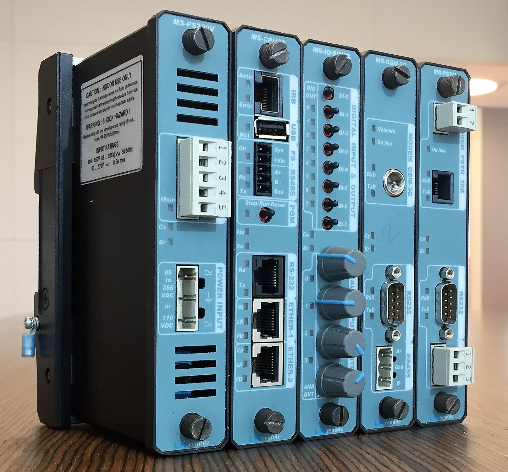 Remote Terminal Unit Modular con entradas y salidas eléctricas y múltiples puertos de comunicación